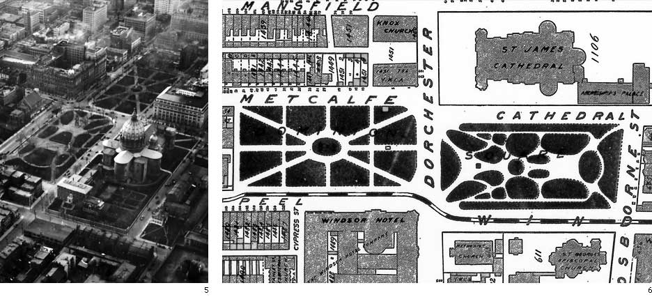 Plan historique, Détail de l’atlas Pinsonneault, Archives nationales du Canada, Ottawa, NMC-16305, 1907